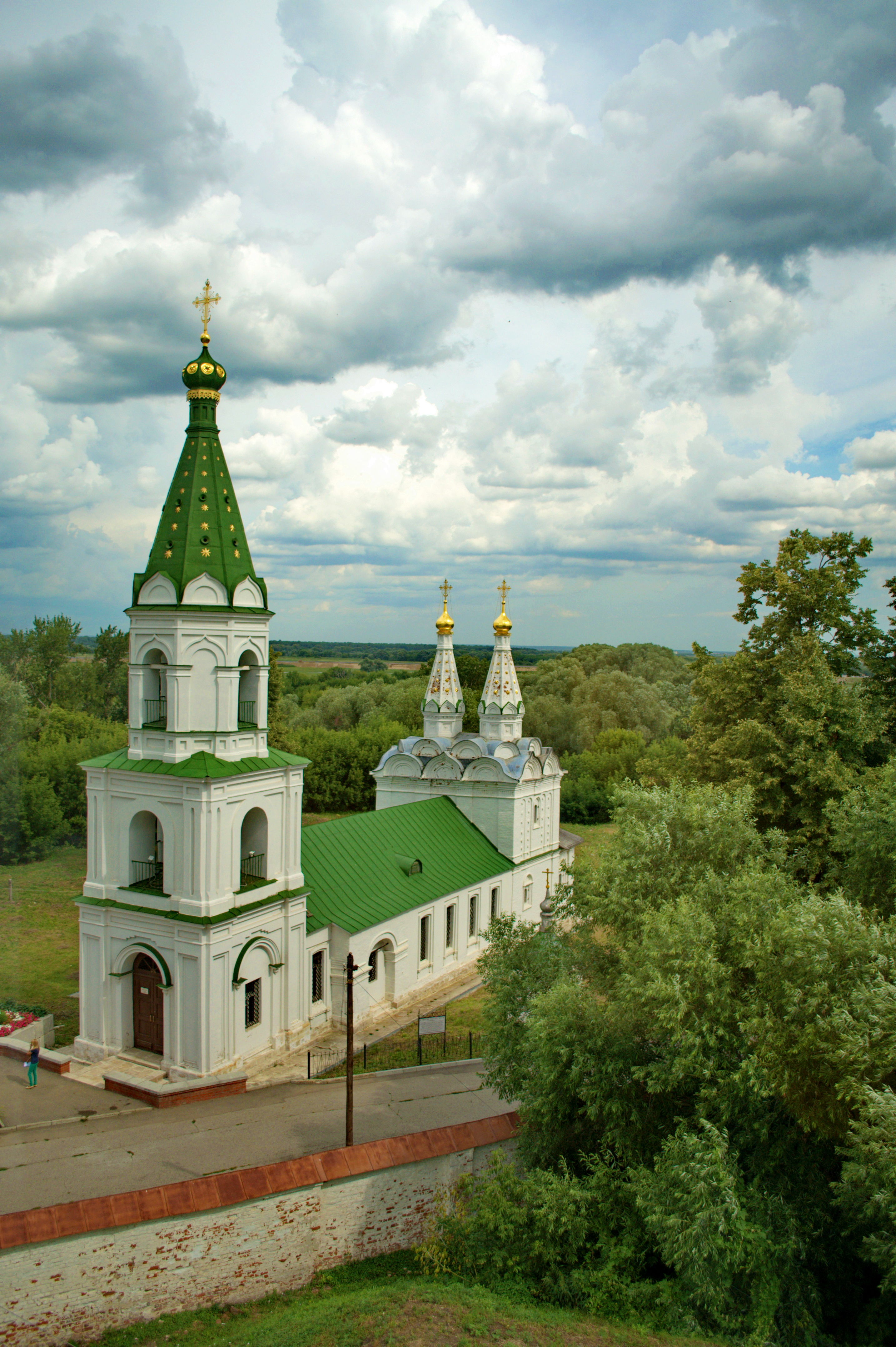 Церковь Сошествия Святого Духа (ц. Духовская) (Рязанская область, Рязань, Кремль)